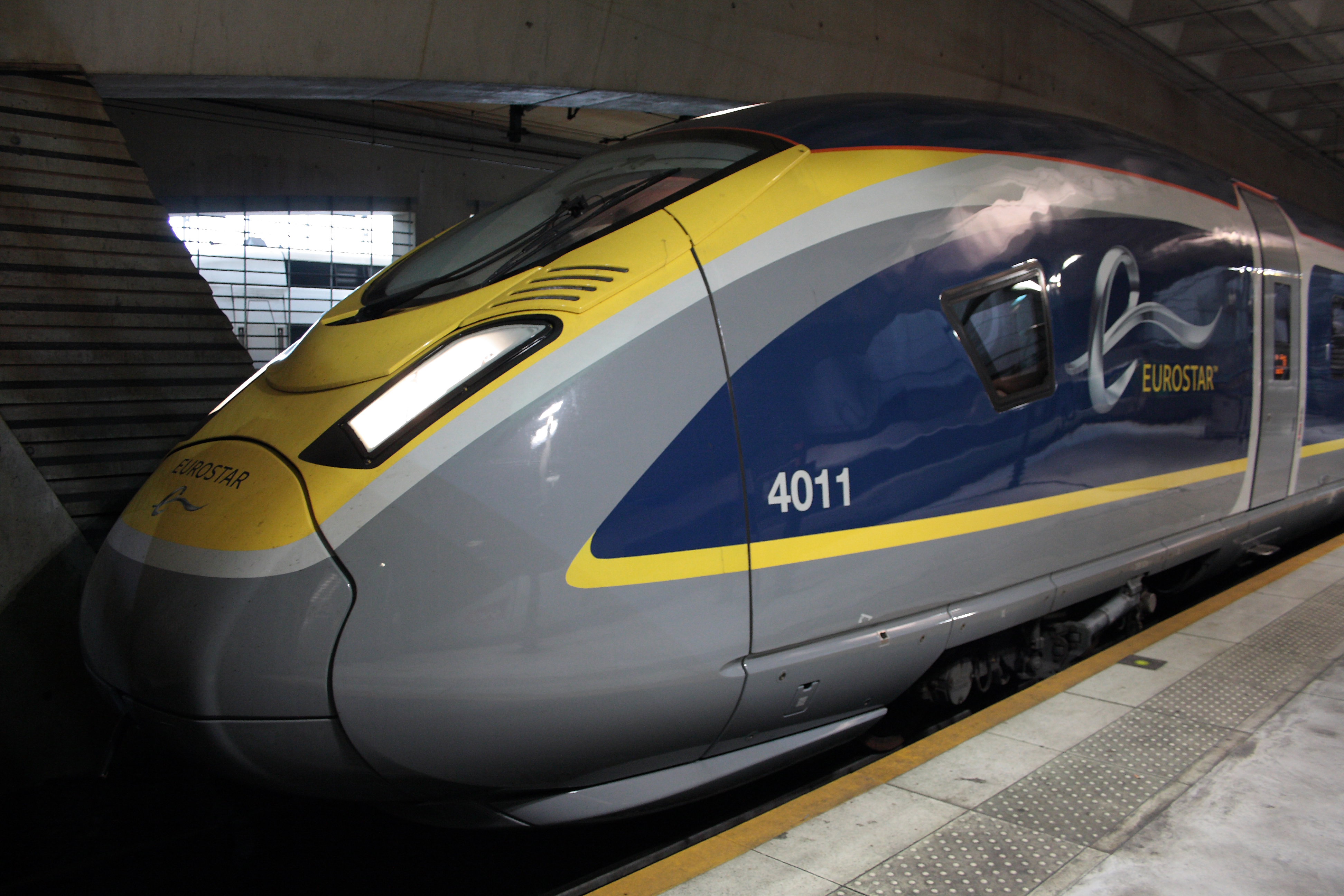 Siemens Velaro d'Eurostar en essais, stationné sur la voie 44.